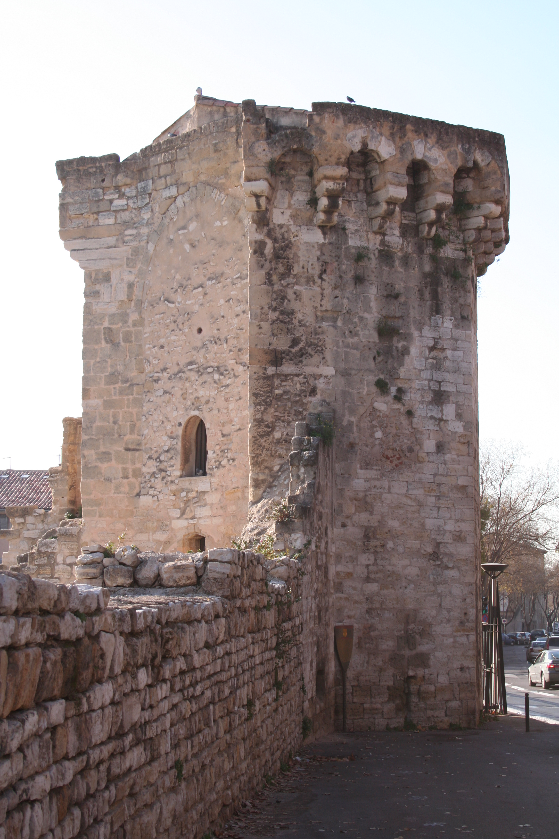 La Tourreluque, avenue Jean Jaurès, Aix-en-Provence (France). Aix fut entourée d’une enceinte sans doute dès sa création. Les murailles romaines restaient encore présentes au 18e siècle dans le Palais comtal. Les remparts protégeant la ville étaient repoussés régulièrement pour englober les agrandissements. La Tourreluque, du provençal luca, regarder, guetter, est un des rares vestiges de ces murs et de loin le plus impressionnant. Elle date du 14e siècle, quand la guerre de Cent ans, menée loin au nord, jetait sur les routes d’une Provence préservée, des bandes de soldats démobilisés devenus pillards. De plan polygonal, avec ses créneaux sur mâchicoulis-arcades, elle est typique de l’architecture militaire d’alors, très semblable à celle d’Avignon. Les remparts ne furent détruits qu’au milieu du 19e siècle et laissèrent la place au boulevard périphérique.